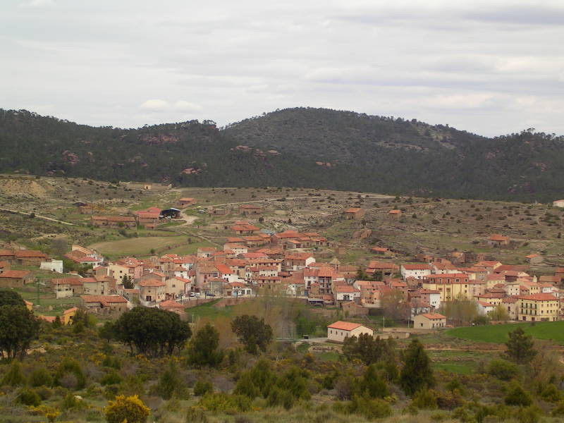 Bezas